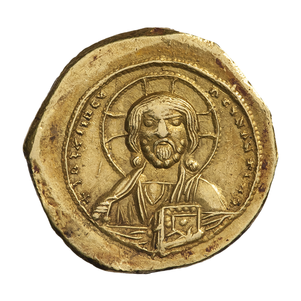 Константин IX Мономах (1042—1055). Номисма тетартерон. Константинополь. Аверс. Иисус Христос с крестчатым нимбом на голове, в фас; нимб разделен прямыми линиями на три части. Правая рука поднята в жесте благословения, в левой — Евангелие. Один ободок.